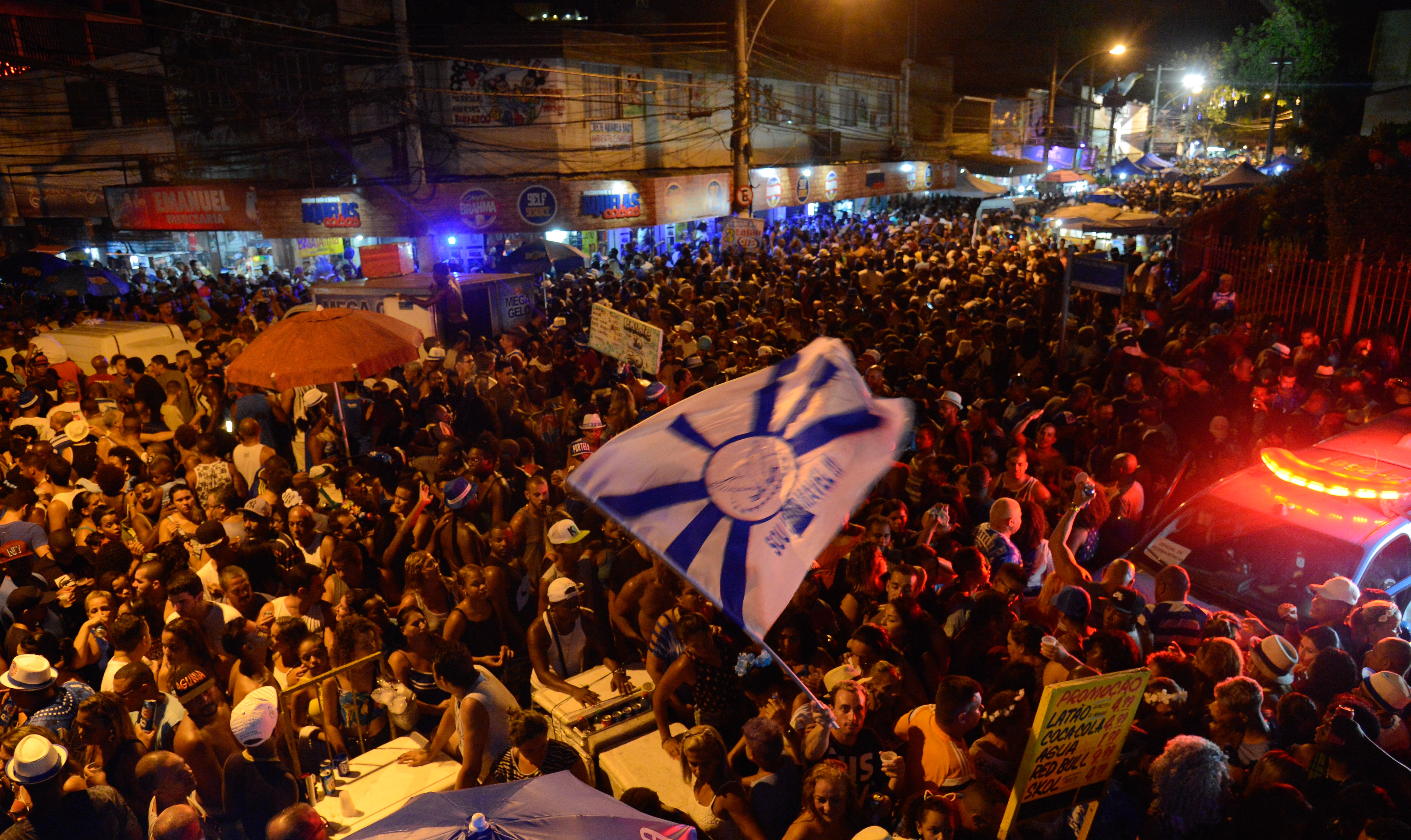 Rio de Janeiro - Fãs lotam a Estrada do Portela em Oswaldo Cruz para celebrar título de campeã do desfile das escolas do Grupo Especial no Sambódromo (Fernando Frazão/Agência Brasil)